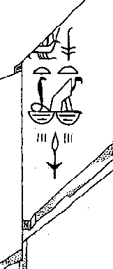 Scherbe mit dem Nebti-Namen Weneg